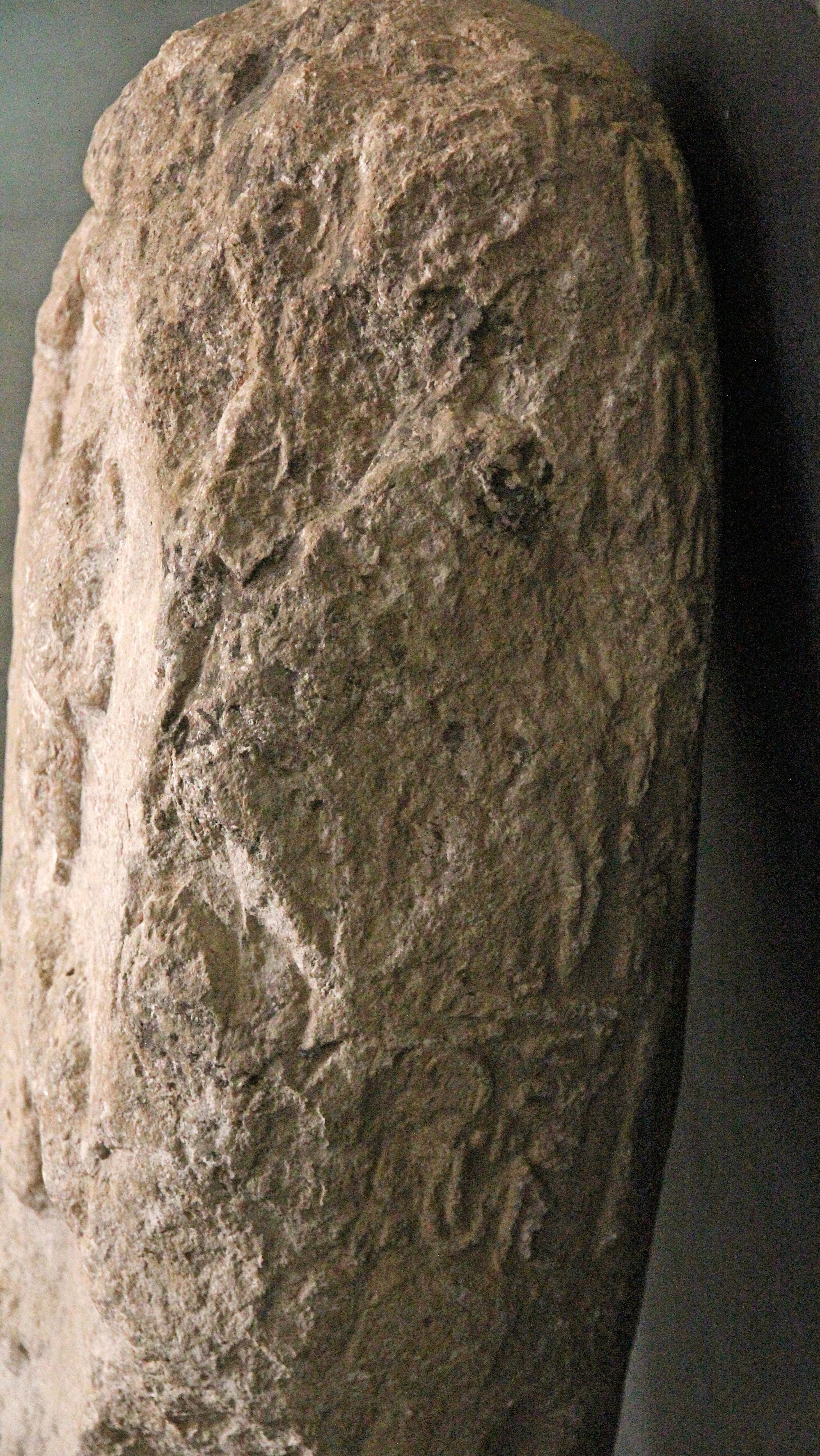 Stele Adıyaman 2 des hethitischen Wettergottes im Archäologischen Museum Adıyaman, Türkei. Rechte Seite mit hieroglyphen-luwischer Inschrift